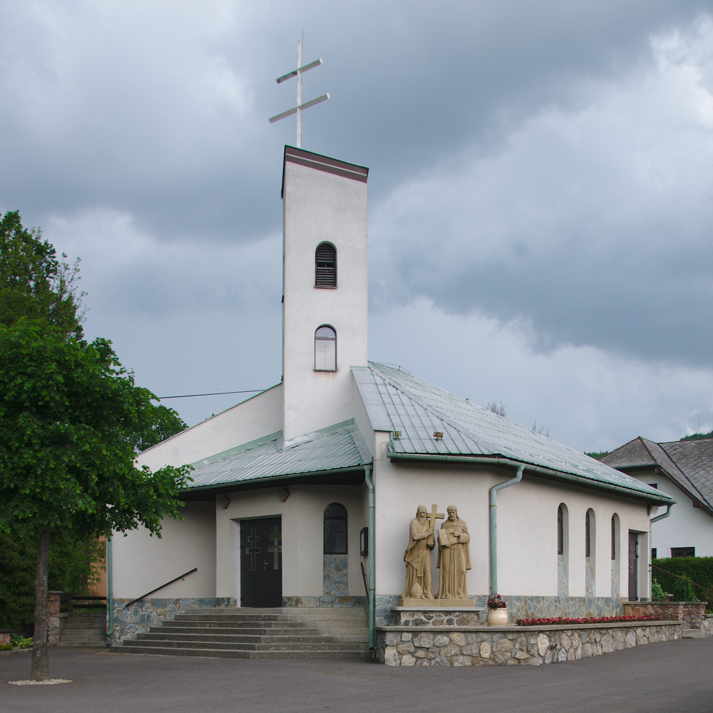 Kostel svatého Cyrila a Metoděje, Horná Breznica, okres Púchov